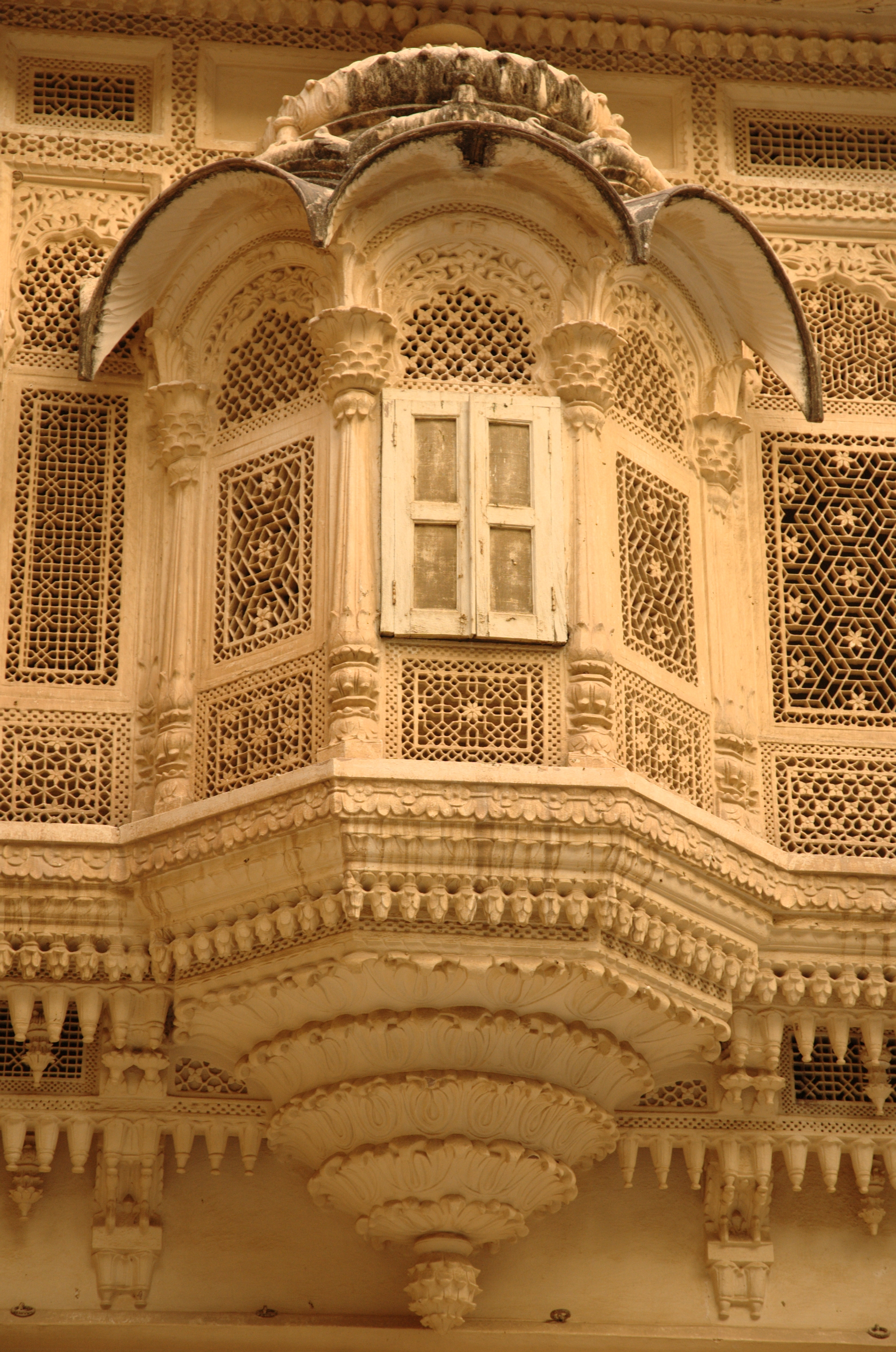 amazing...